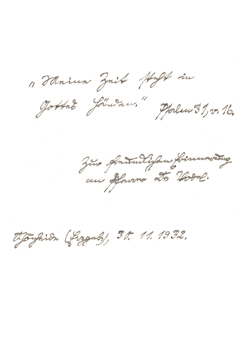 Sütterlinschrift folgenden Inhalt`s in einem Poesiealbum:”Meine Zeit steht inGottes Händen” Psalm 31,v. 16.Zur freundlichen Erinnerungan Pfarrer Dr. Vodel.Schönheide (Erzgeb.) 30. 11.1932.